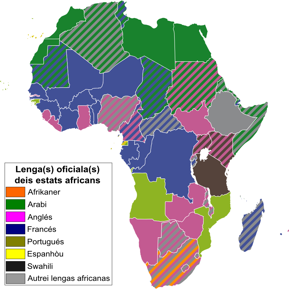 Occitanizacion d'un document creat per NordNordWest lo 26 de març de 2010. Nom iniciau d'aqueu document : Official languages in Africa.svg. Representacion dei lengas oficialas sus lo continent african.